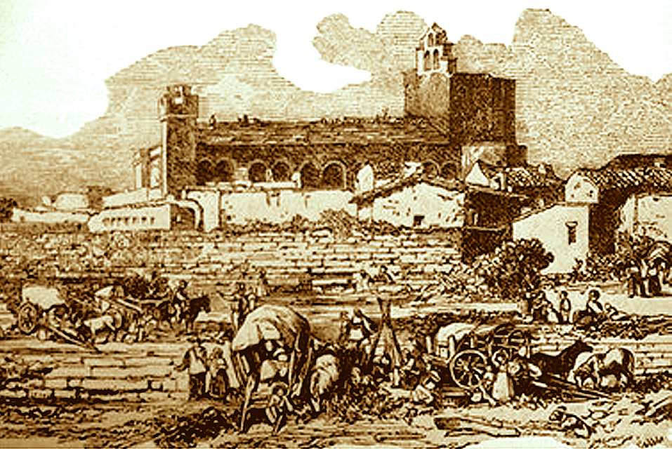 Campement de pèlerins aux Saintes-Maries-de-la-Mer, en 1852, d'après un dessin de J. B. Laurens